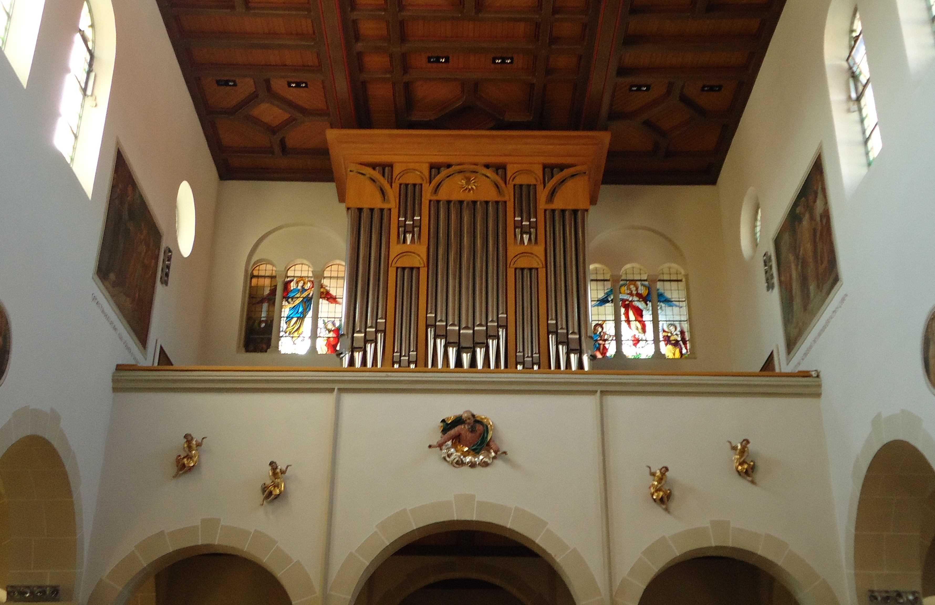 Stadtpfarrkirche St. Jakob Mitterteich - Empore und Orgel